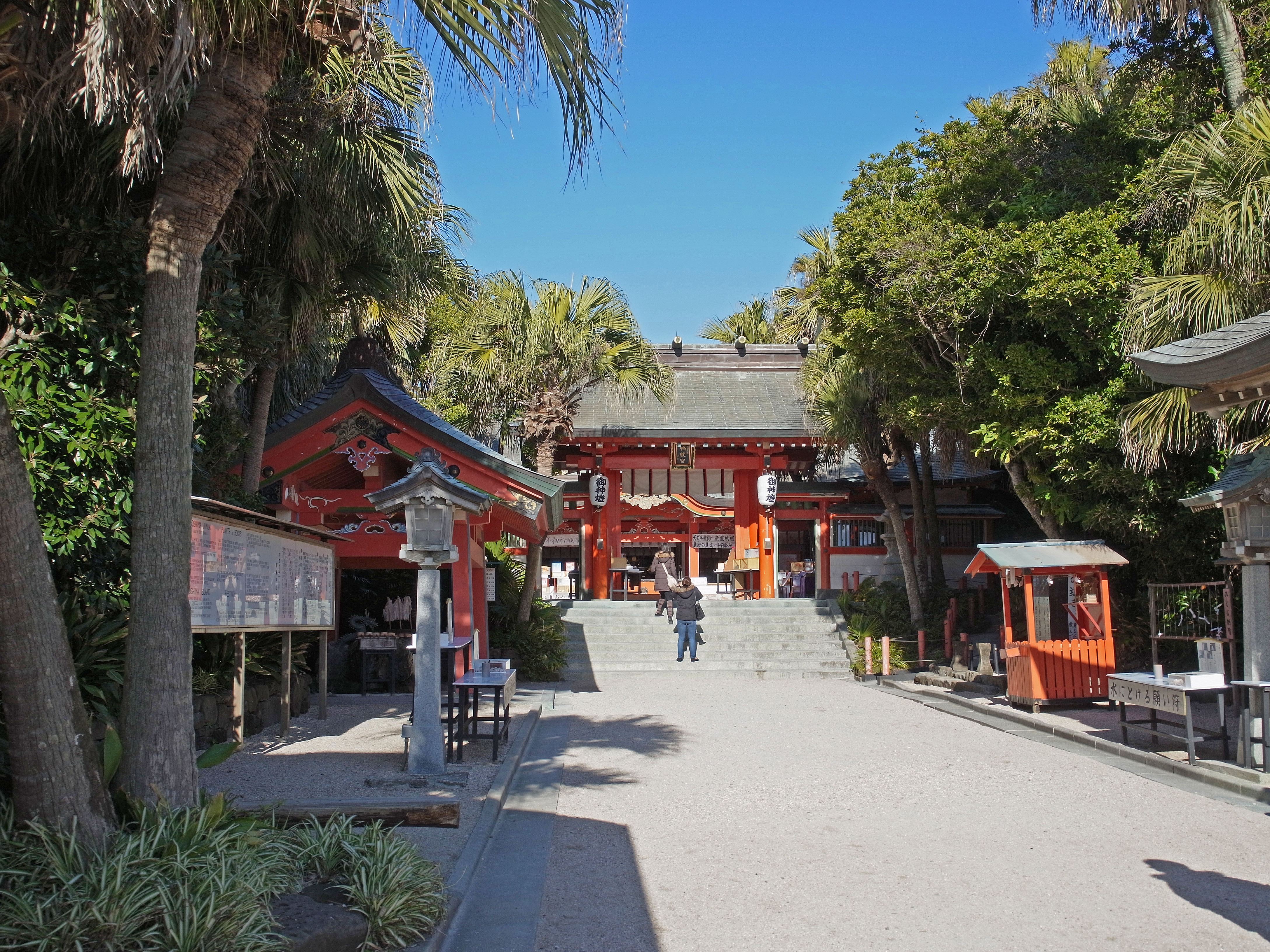 Ao-Shima shrine ., 青島神社